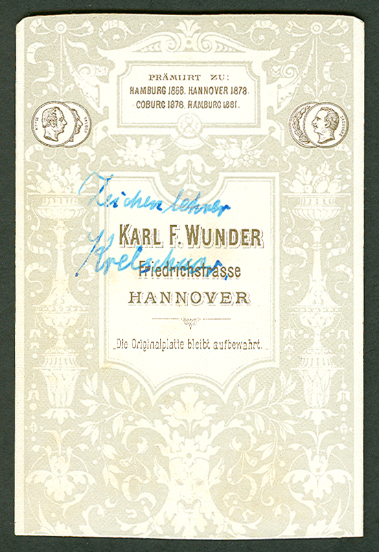 Der Zeichenlehrer aus Hannover, Johann Heinrich Wilhelm Kretschmer, und Tochter Marie Kretschmer, fotografiert von Karl F(riedrich) Wunder. Sohn Heinrich Kretschmer vermachte die Fotos, gemeinsam mit zwei Alben (eins von 1879) mit Bleistiftzeichnungen (meist während einer Schweizreise entstanden) , an die Hausdame von Wilhelm bzw. Marie Kretschmer, Henriette Mantshorst oder Mantehorst. Henriette war eine Schwester der Mutter von Hugo Duensing, der Anfang 1953 in Goslar wohnte. Dessen schriftlich niedergelegter Wunsch war es 1953, daß diese "Dokumente eines früheren Kunstschaffens gehütet werden". Aus Duensings Händen gingen die Werke irgendwann über eBay zurück an den früheren Wohnort von Wilhelm Kretschmer (der am später jedoch in Hamburg gelebt haben soll). Happy birthday - Wikipedia! Danke, Hannover!